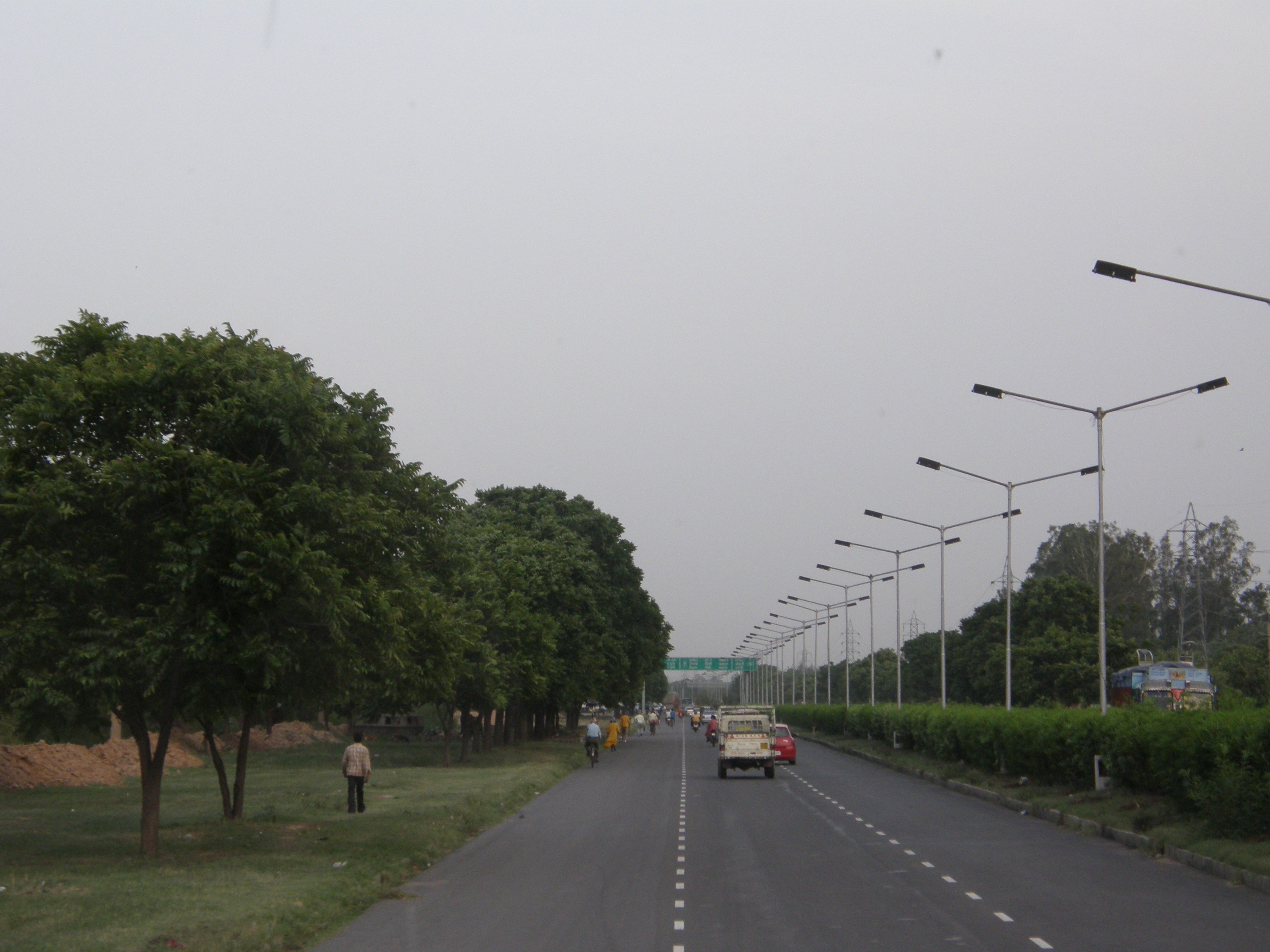 Chandigarh city road Punjab, Haryana India